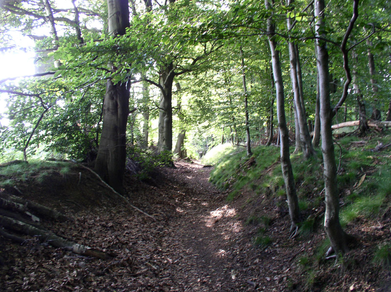 Bodendenkmal Bergische Eisenstraße, 2004 selbst fotografiert, GFDL